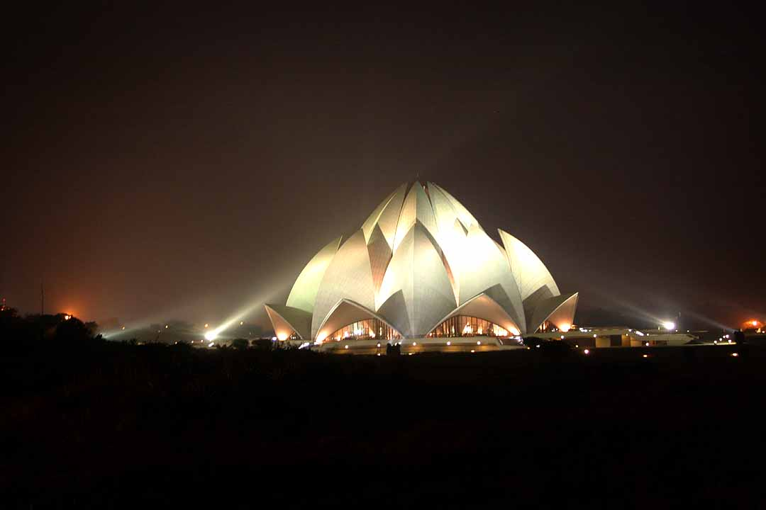 Lotus Temple